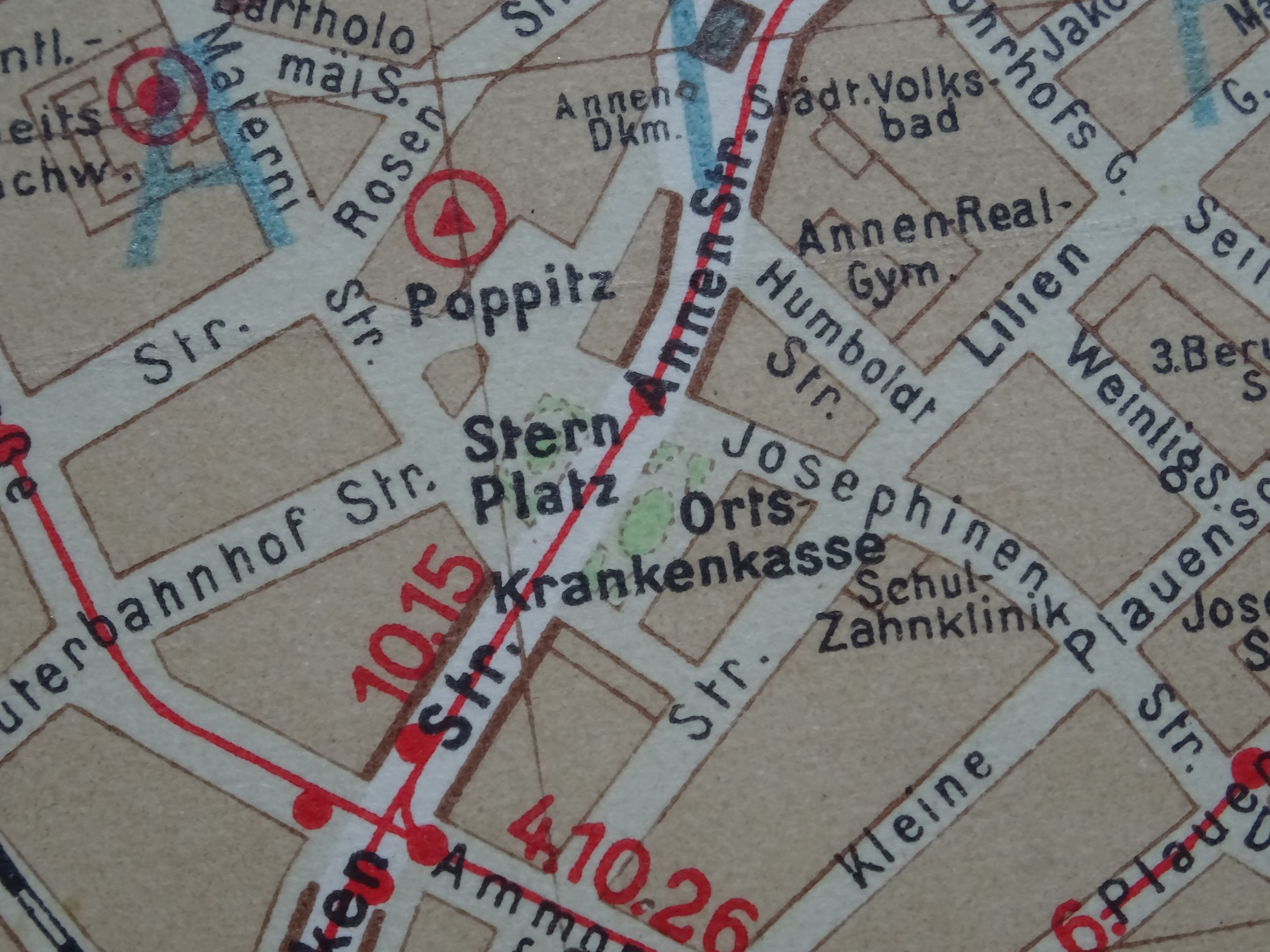 Dresden-Wilsdruffer Vorstadt, Stadtplan Dresden von 1928, Kartenausschnitt